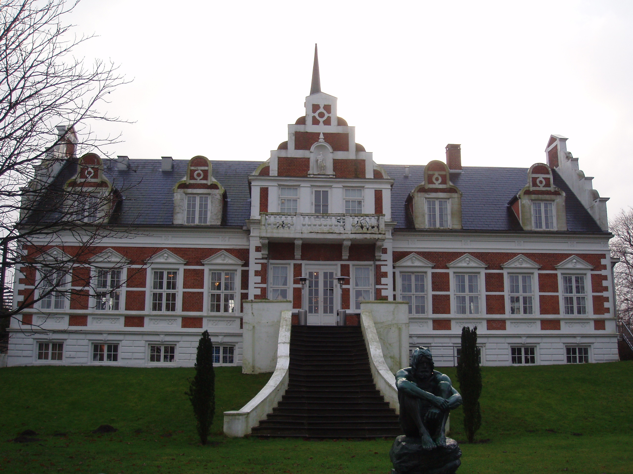 Sohngaardsholm, Aalborg, Denmark